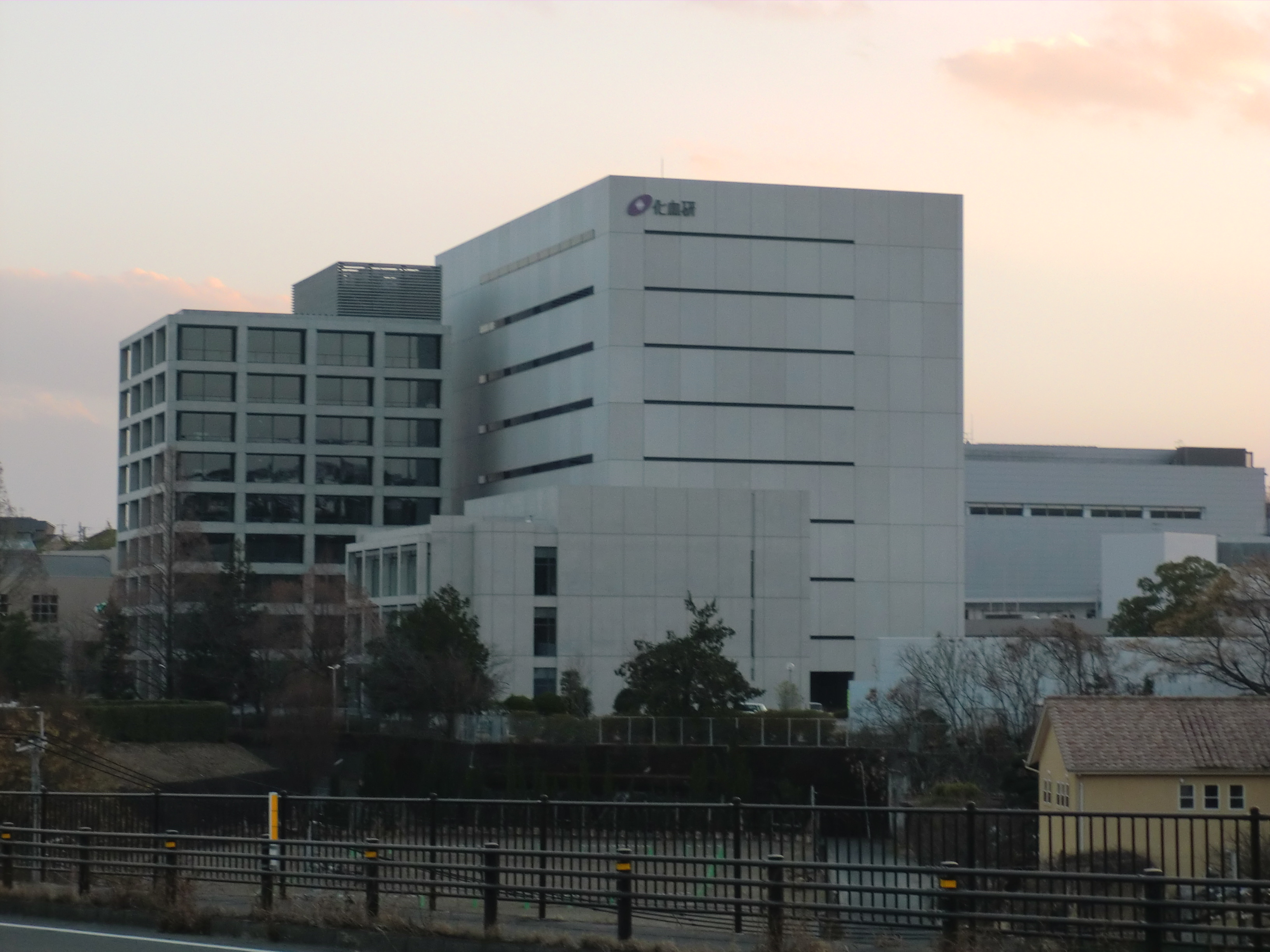 熊本市北区にある化血研